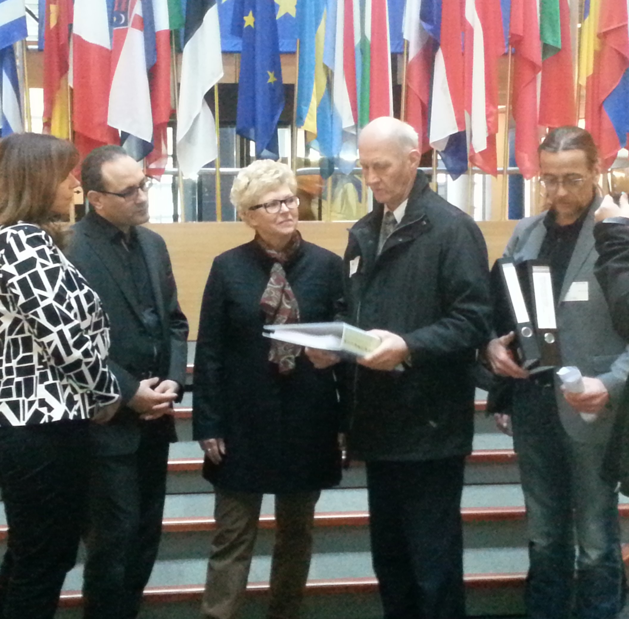 Übergabe der BKF-Petition Lese-Akte von Gregor Ter Heide und Udo Skoppeck am 27.11.2014 im EU-Parlament, an Gabriele Preuß, Jutta Steinruck und Ismail Ertug